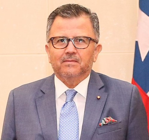 Gustavo Ayares Ossandón bei der Übergabe seiner Akkreditierung als chilenischer Botschafter bei Osttimors Präsident Francisco Guterres